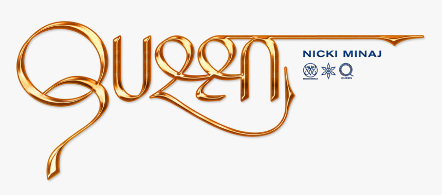 Fuente de la portada del cuarto álbum de Nicki Minaj